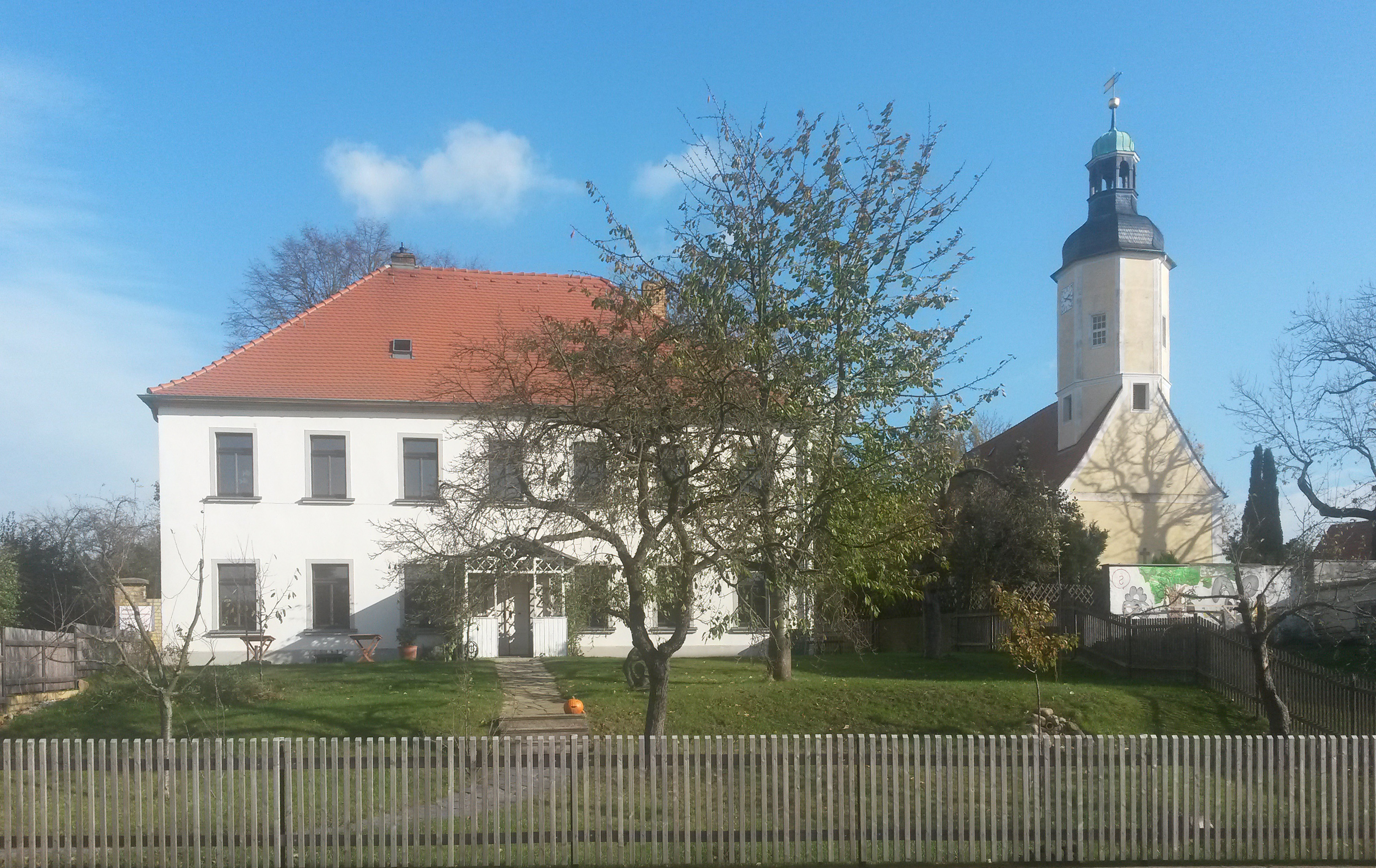 Geburtshaus von Friedrich Naumann in dem kleinen Ort Störmthal, südlich von Leipzig.